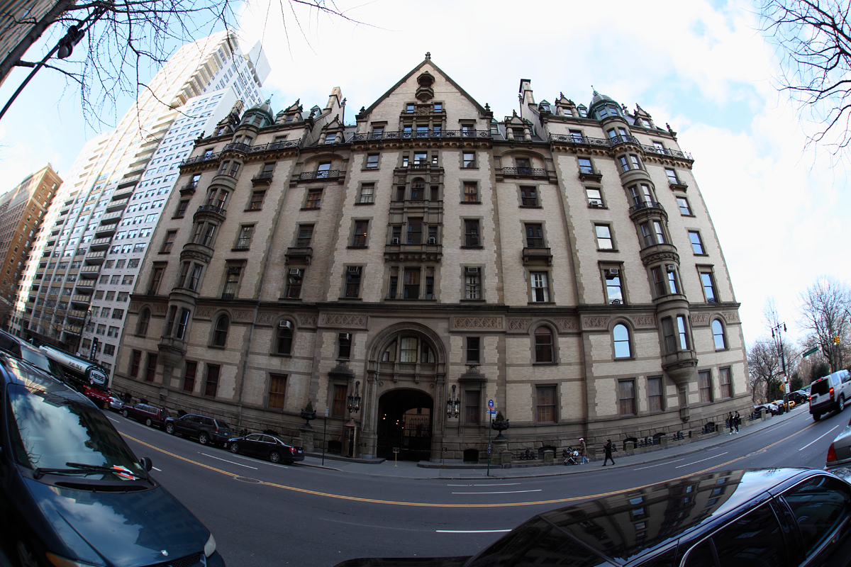 Здание Дакота в Нью-Йорке возле которого 8 Декабря 1980 года был убит Джон Леннон